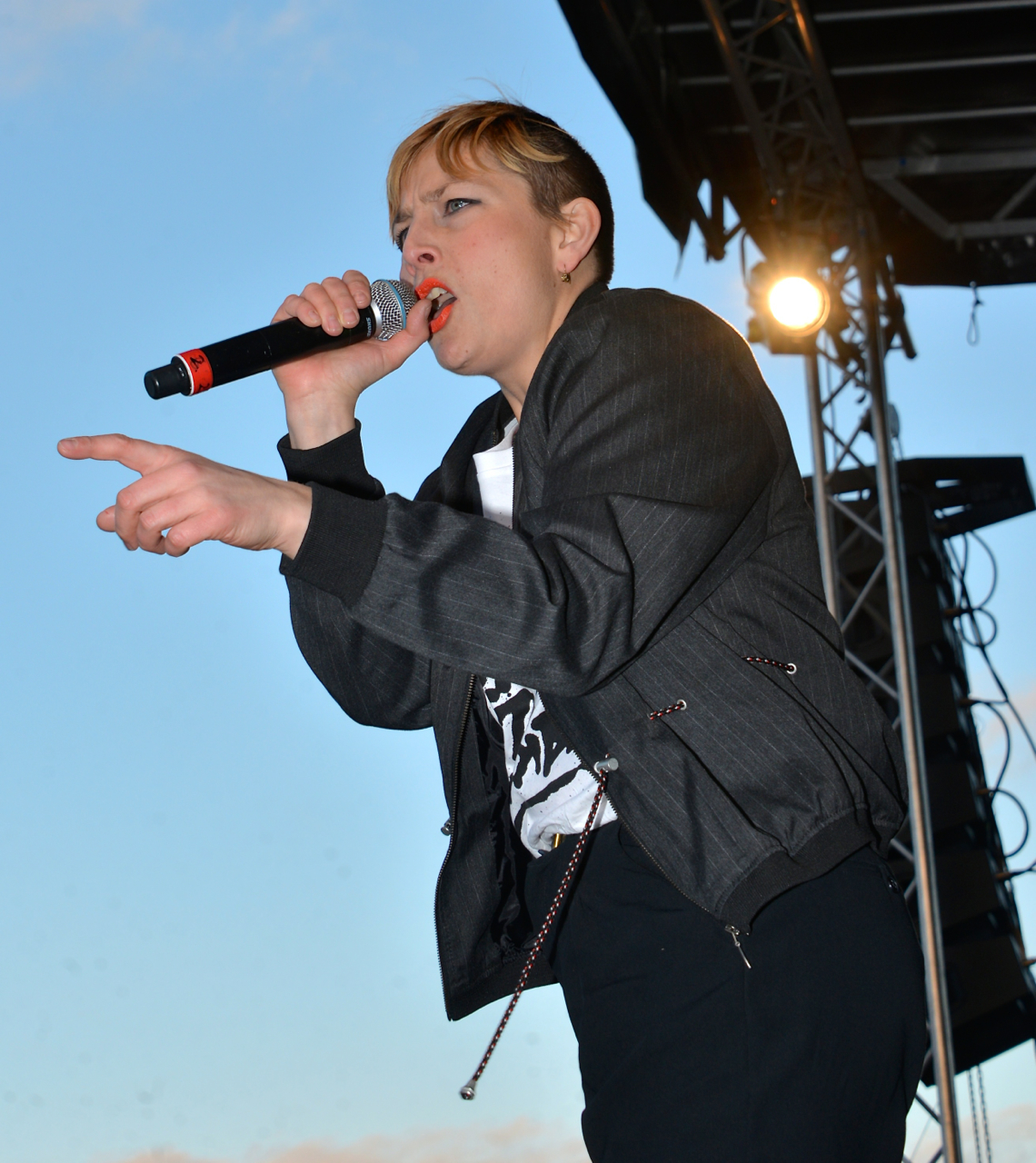 Antirasistdemonstrationerna i Kärrtorp den 22 december 2013.